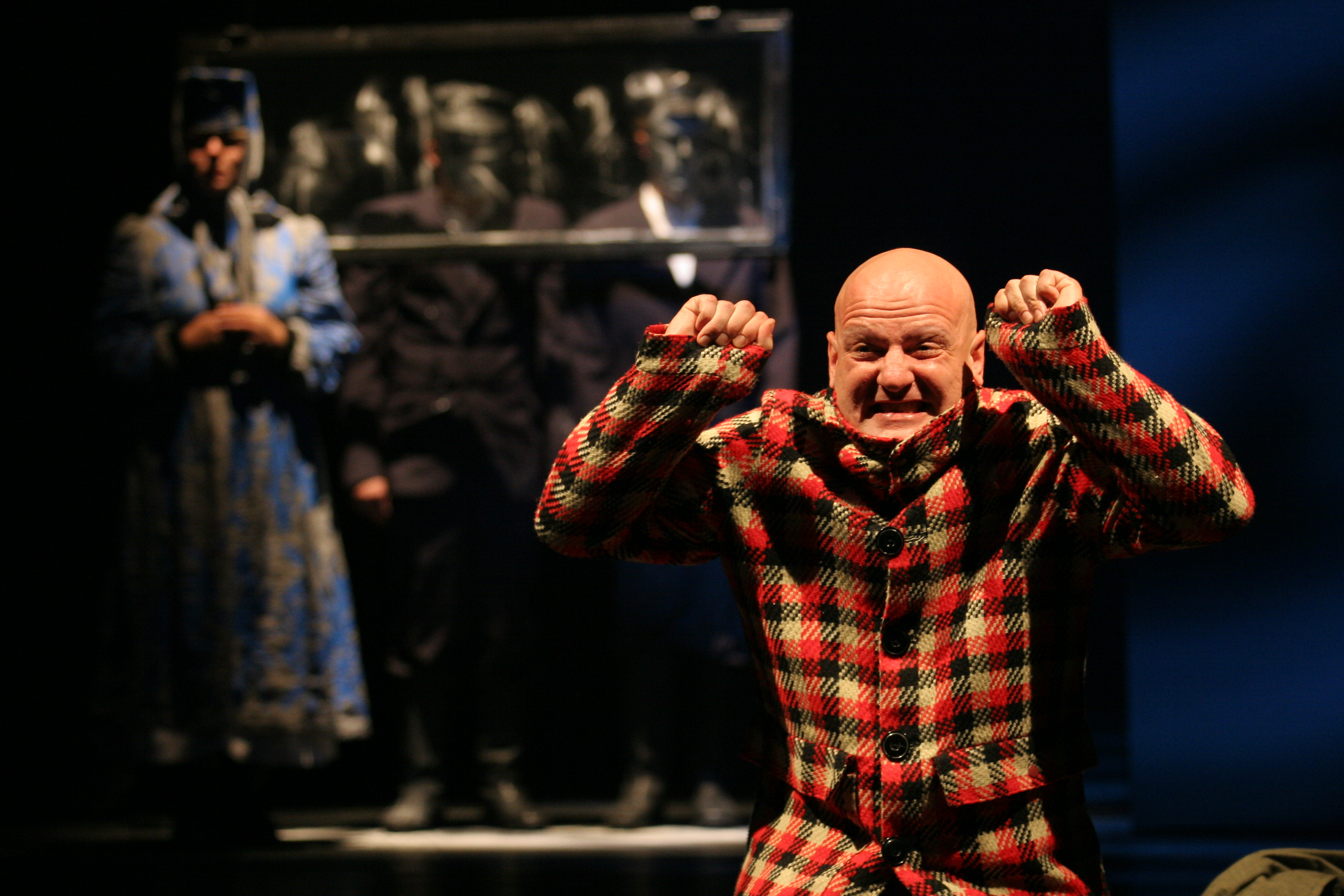 Lavastus "Castrozza" (2007). Lavastaja ja muusikaline kujundaja Taago Tubin, kunstnikud Mihkel Ehala ja Liisa Soolepp. Valguskunstnik Karel Kansvein. Fotol vasakult Maive Käos, Kait Kall, Glen Kelp ja Tarmo Tagamets. Foto: Dmitri Kotjuh